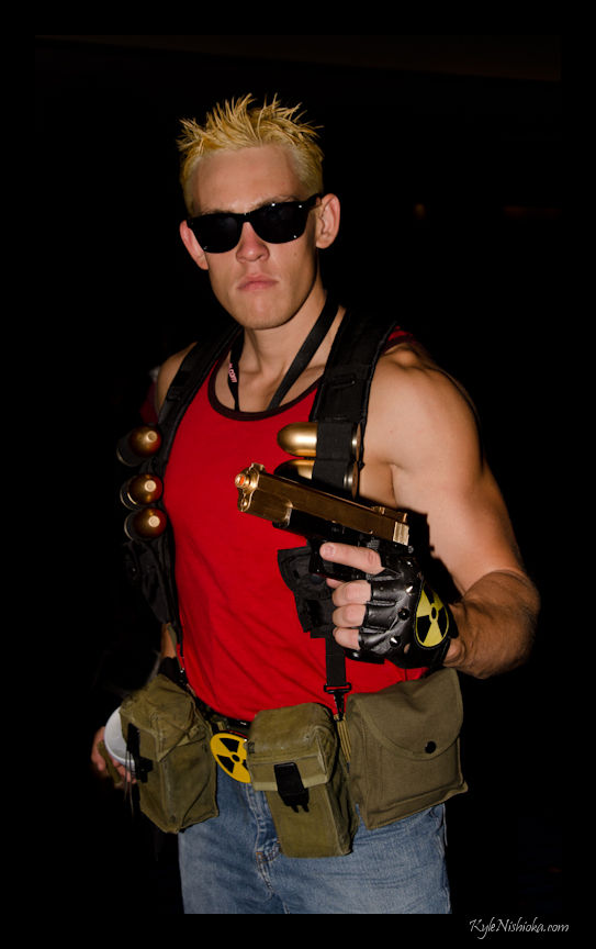 DragonCon 2011